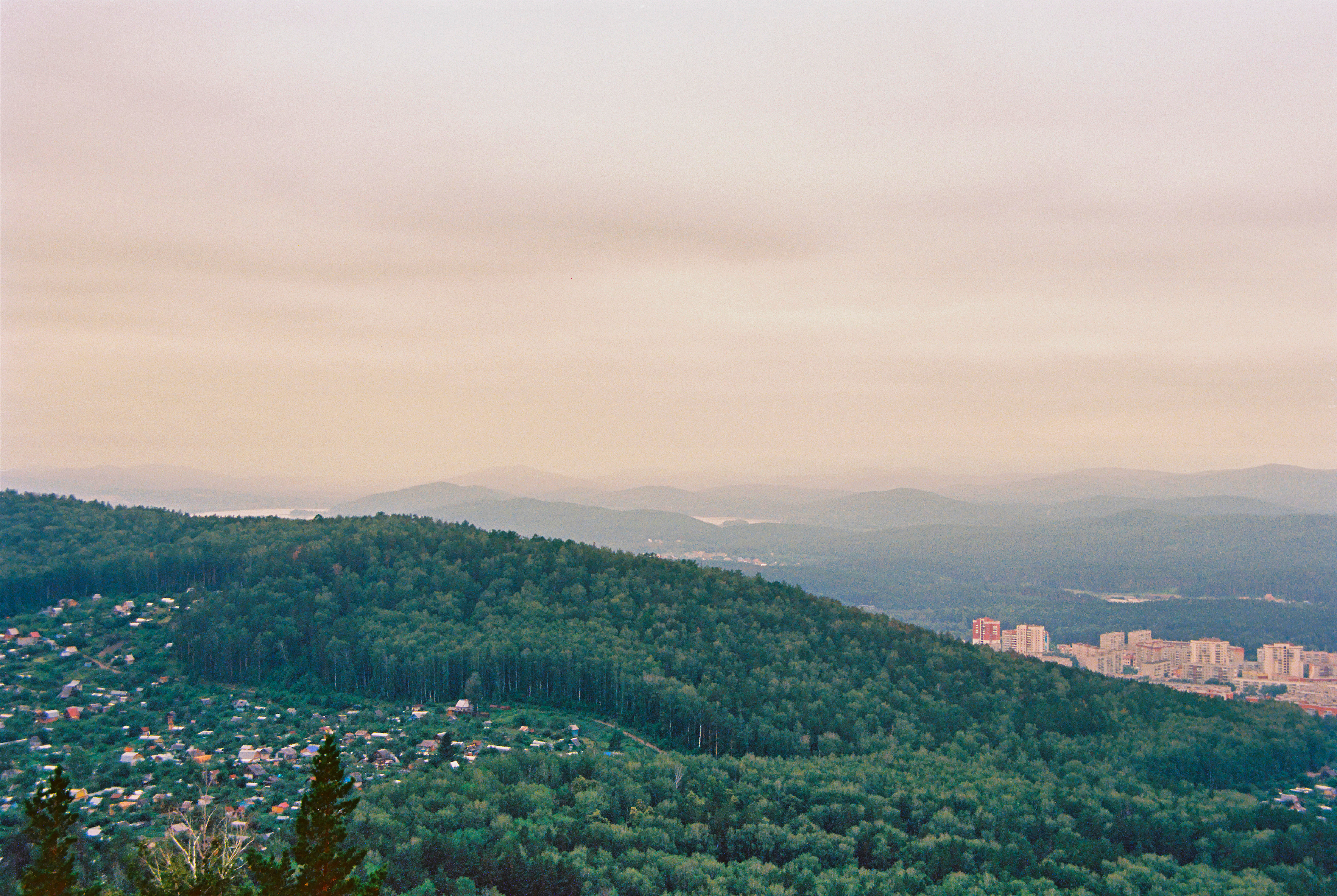 Ильменский государственный заповедник: в восточных предгорьях Южного Урала на Ильменском хребте, к северо-востоку от г. Миасс. Большая часть расположена на территории, административно подчиненной г. Миасс, остальная врезается в соседние районы - Чебаркульский и Аргаяшский, заканчиваясь вблизи с. Ново-Андреевка, в 20 км от г. Карабаш, Миасс-1, Миасский городской округ, Челябинская область This image is related to the protected area of Russia number 7400204